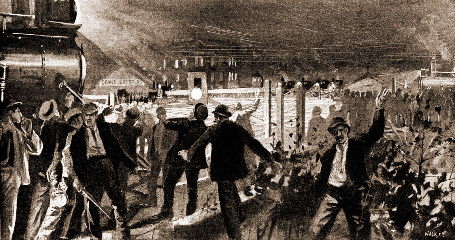 American Railway Union-eko langileak barrikaden hasieran, 1894ko ekainaren 26ko gauean.